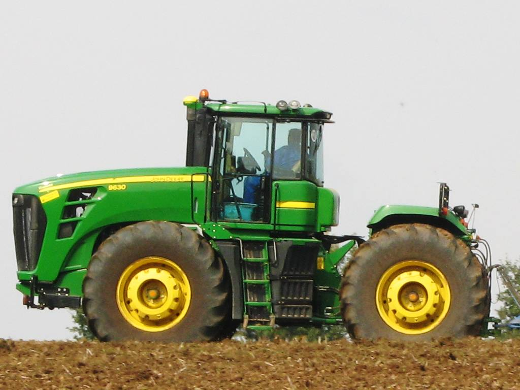 John Deere 9630 in Sachsen-Anhalt